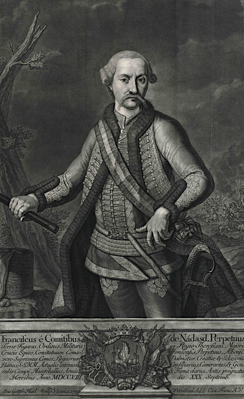 Ференц Надашдь